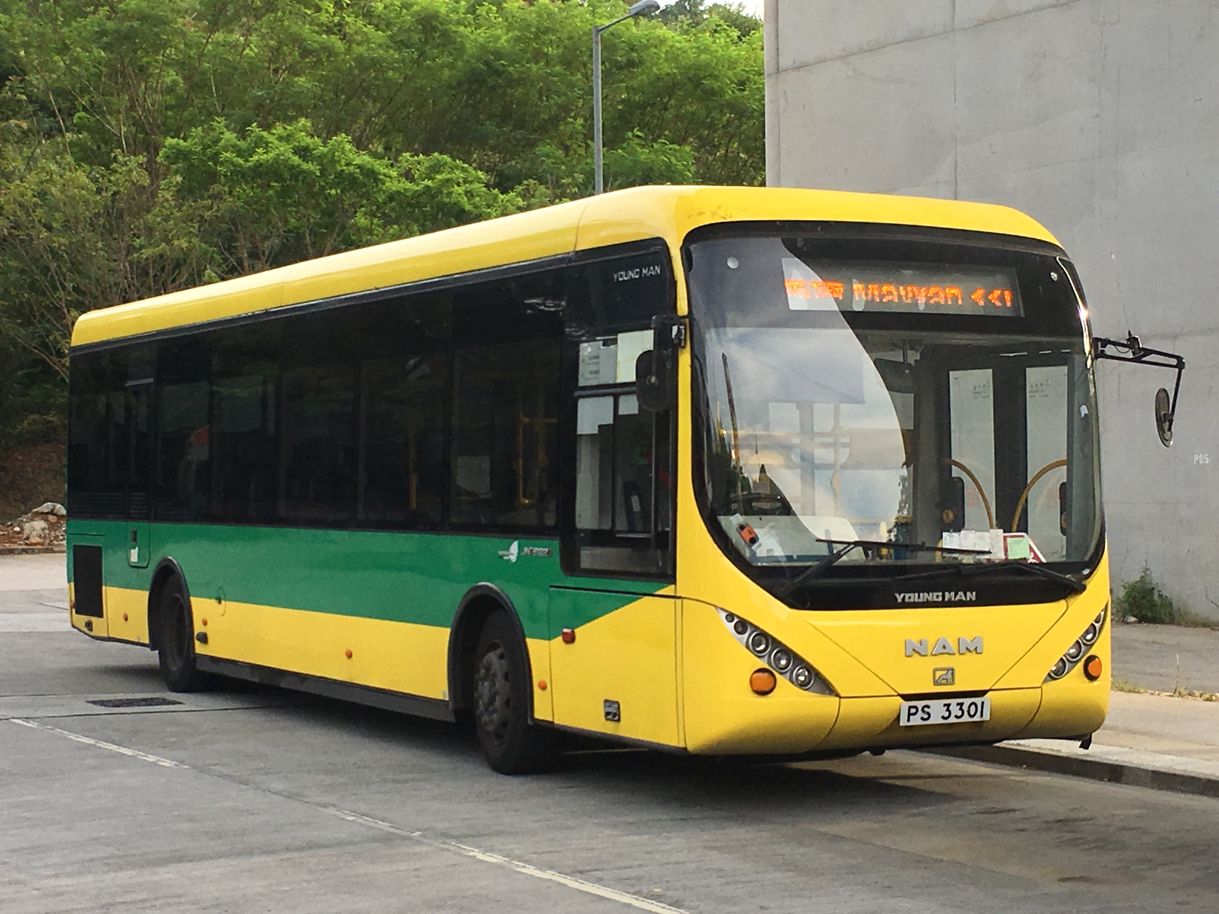 This photo is taken in Ma Wan.